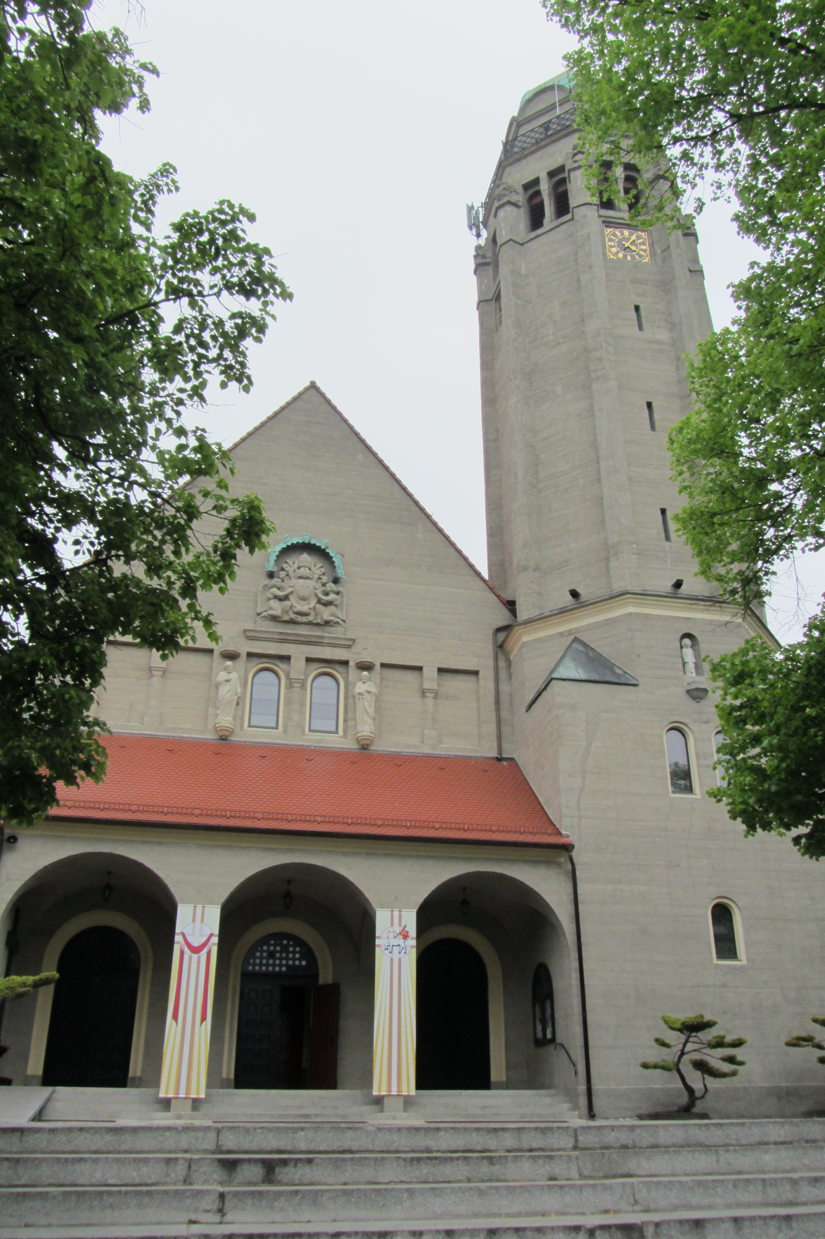 Vorderansicht der Peter und Paul Kirche in Oppeln (poln. Opole)